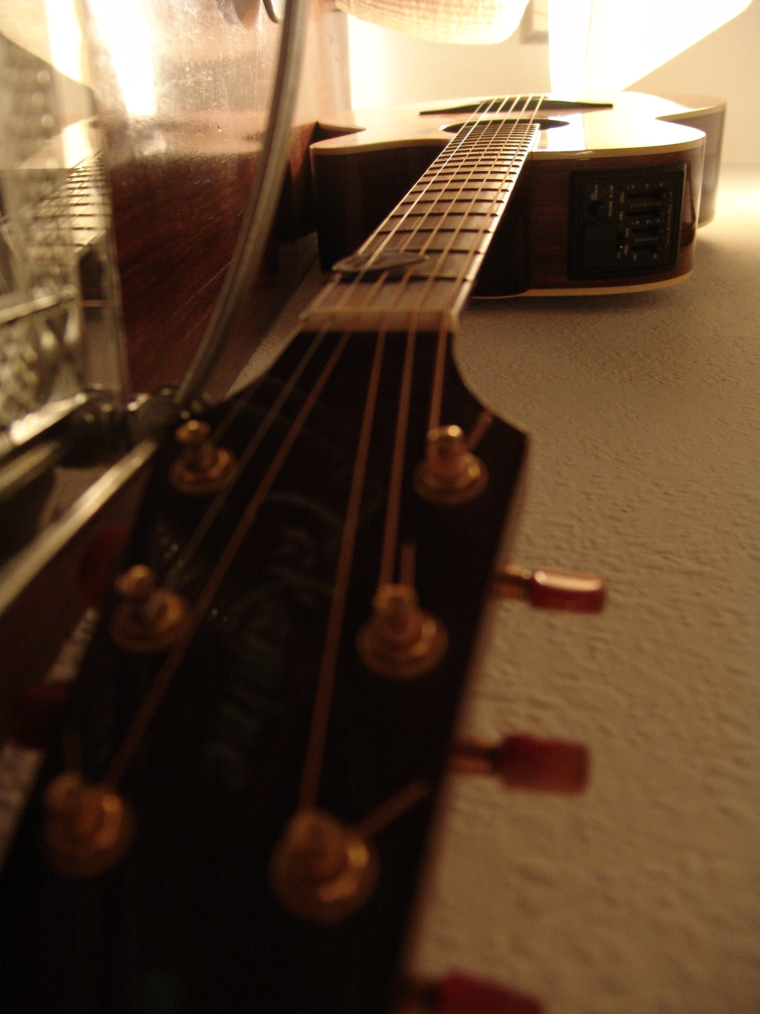 Guitare Takamine model Santa Fé